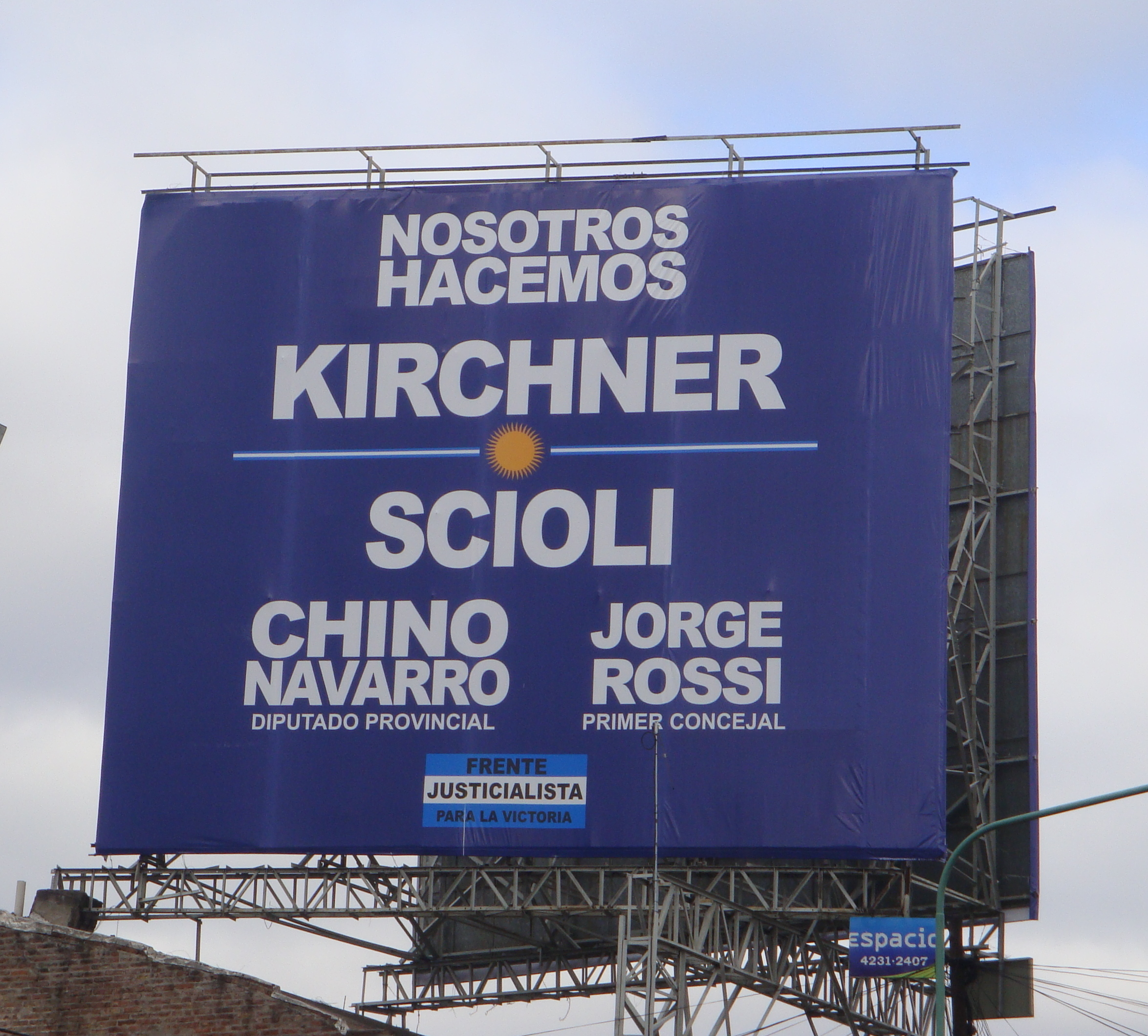 Cartel publicitario de la fórmula Kirchner-Scioli, en Lomas de Zamora